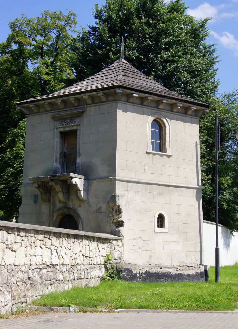 Pińczów - zespół zamkowo-pałacowy: pawilon ogrodowy, widok od północnego zachodu (zabytek nr A.660/1-8 z 16.10.1957, z 19.12.1957 i z 14.01.1972)